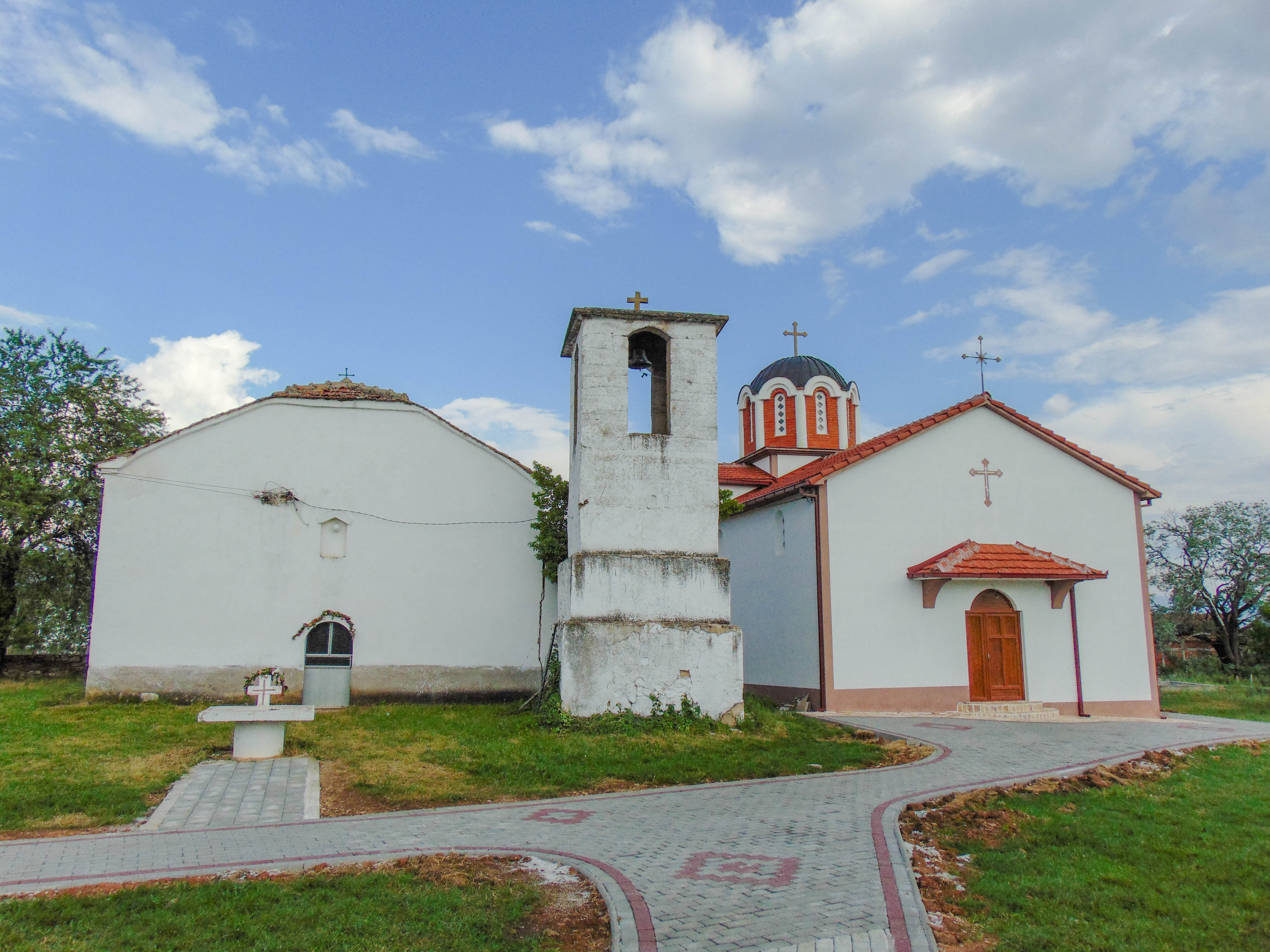 Црква „Св. Ѓорѓи“ - Покрајчево